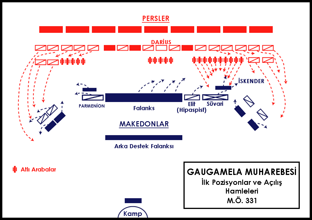 Gaugamela Muharebesi-Makedonlar (İskender) ve Persler (3.Darius)-M.Ö. 331-İlk Pozisyonlar ve Açılış